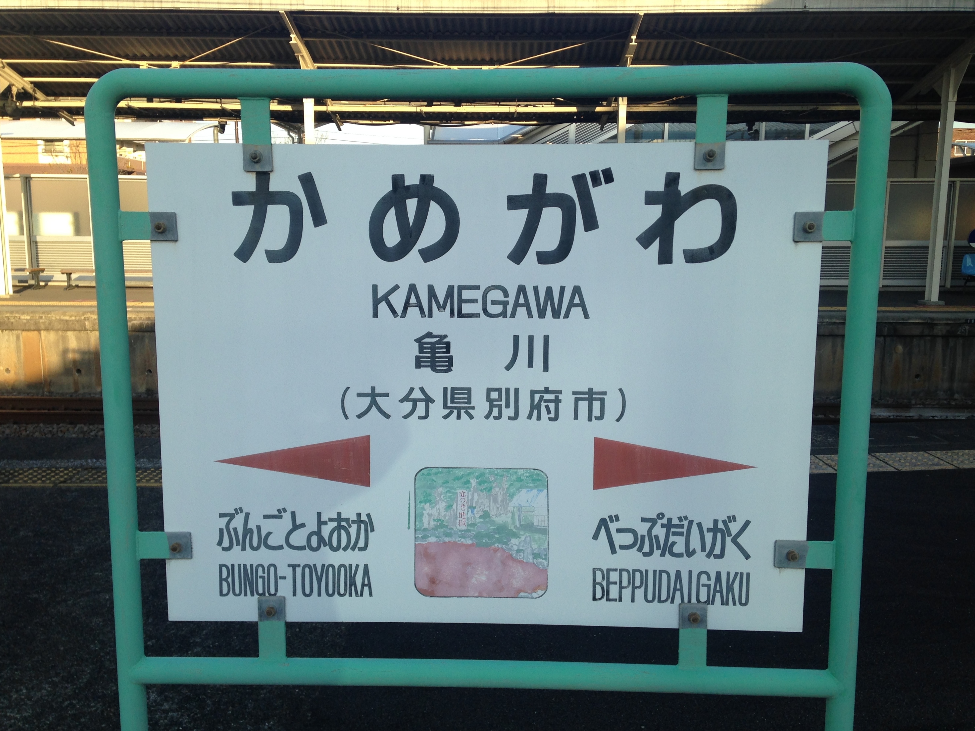 亀川駅の駅名標。イラストは「血の池地獄」